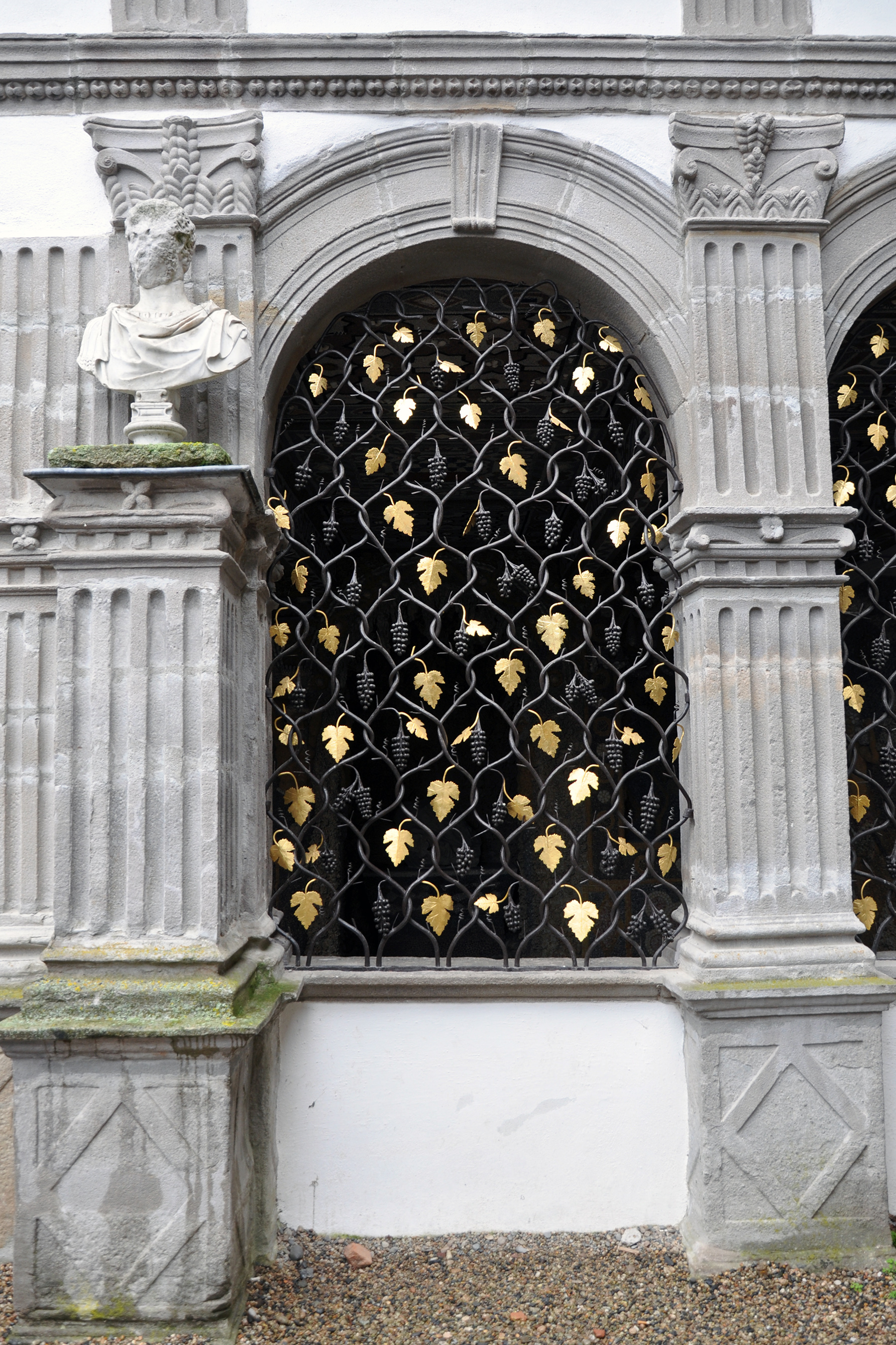 La bâtie d'Urfé. La grille de le salle de fraîcheur ( salle de rocaille ).